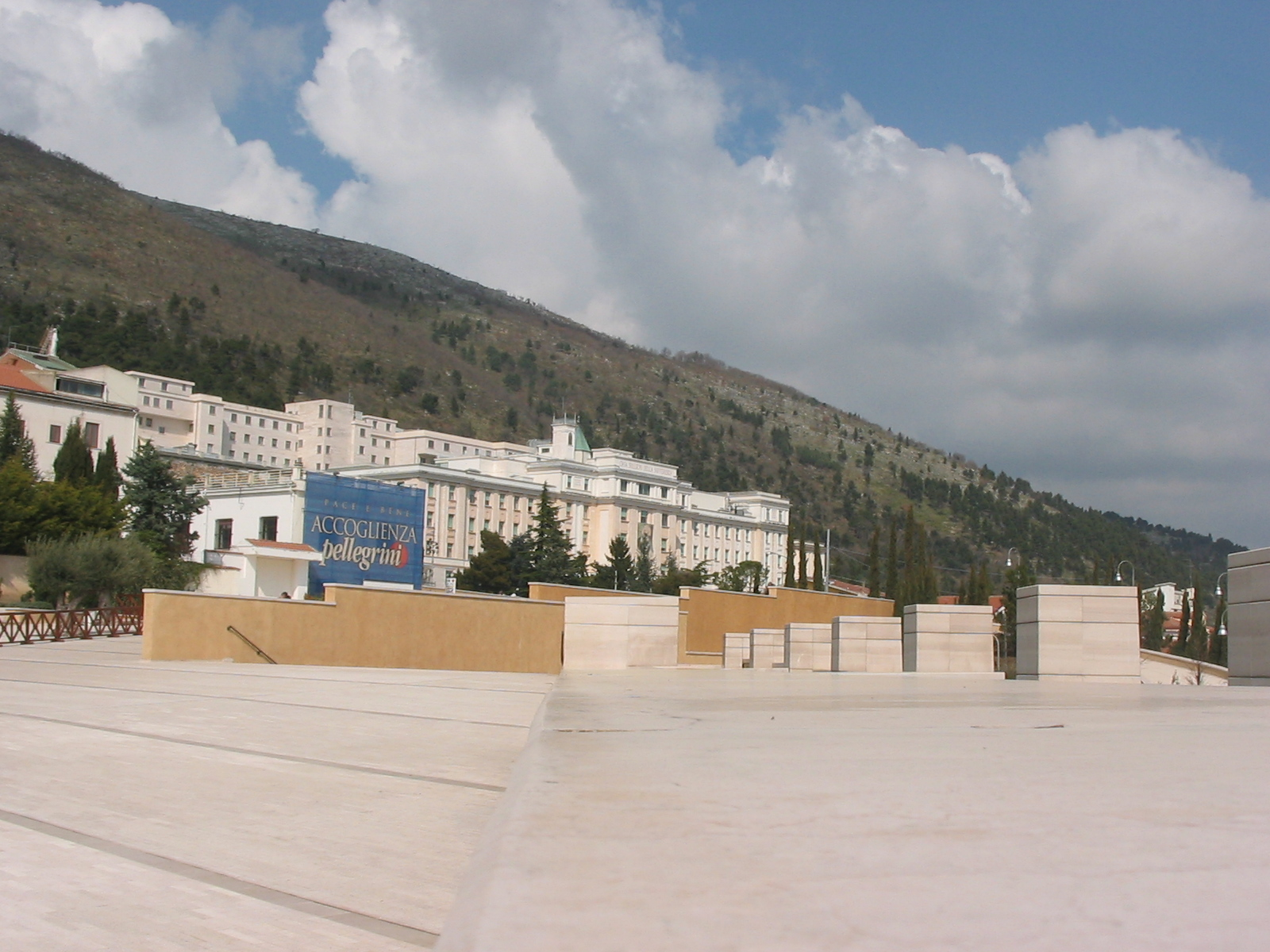 Casa Alivio del sufrimiento, en San Giovanni Rotondo (Foggia, Italia) fundado por el Padre Pío.